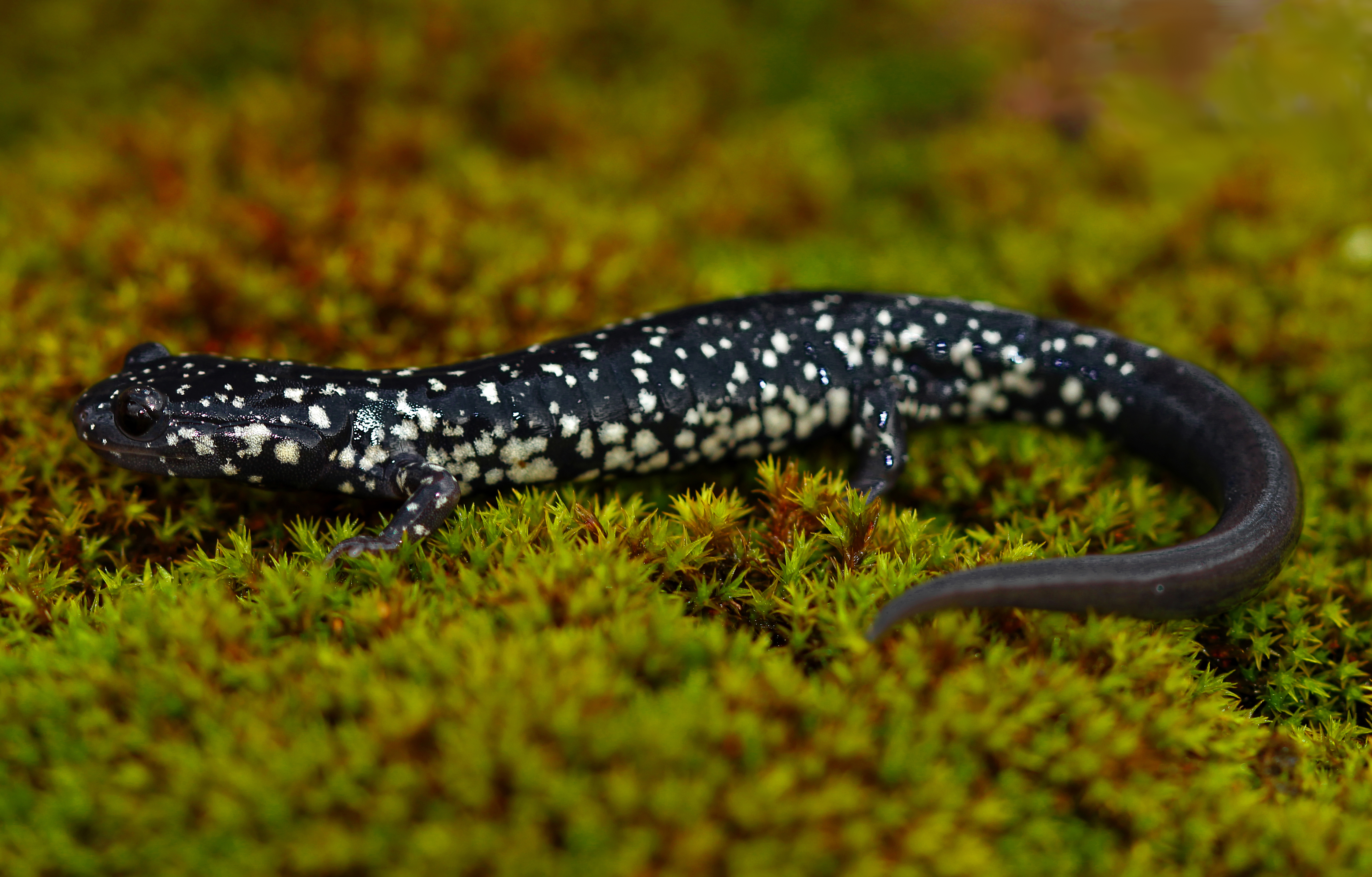 Plethodon albagula